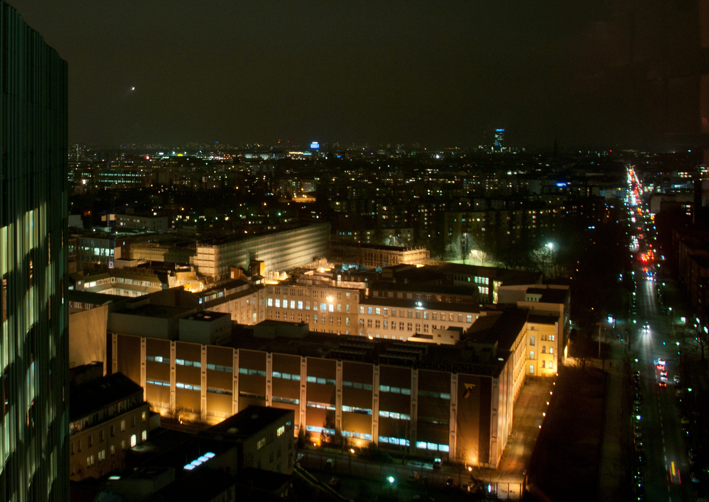 Wikipedia Stammtisch Berlin zu Besuch im Springer- Hochhaus